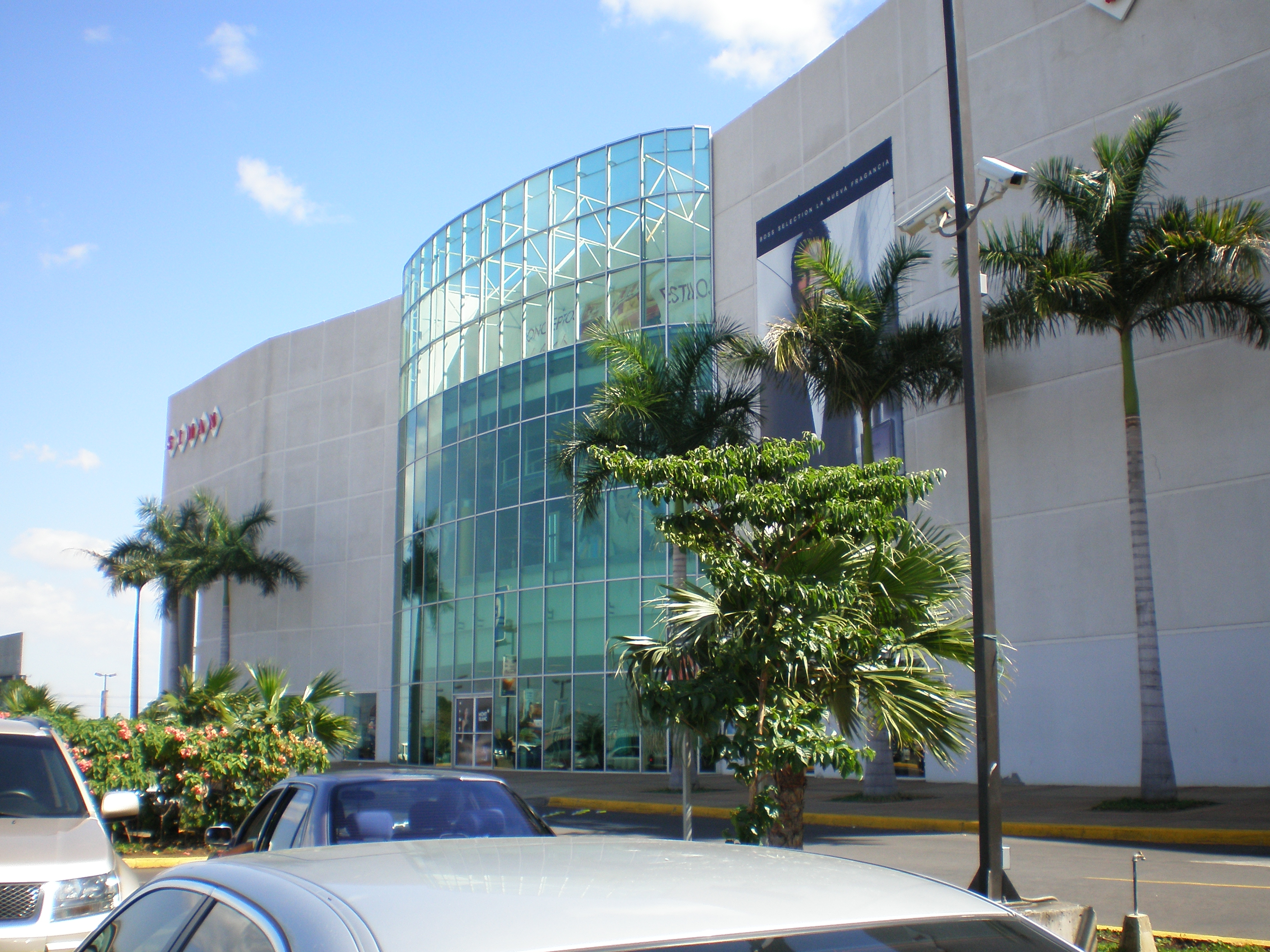 Siman en Managua